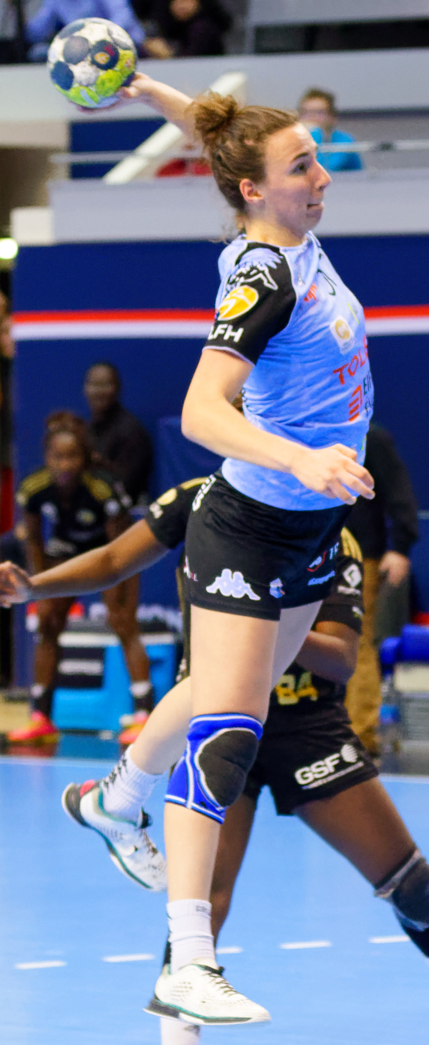 Rencontre Issy Paris Hand / Chambray. A Coubertin, le 26 février 2017.